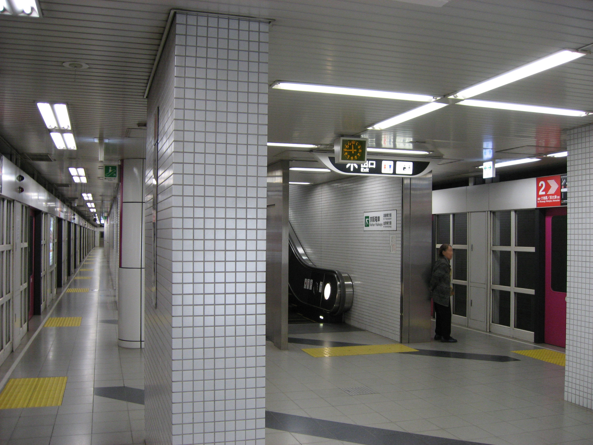 三条京阪駅プラットホーム